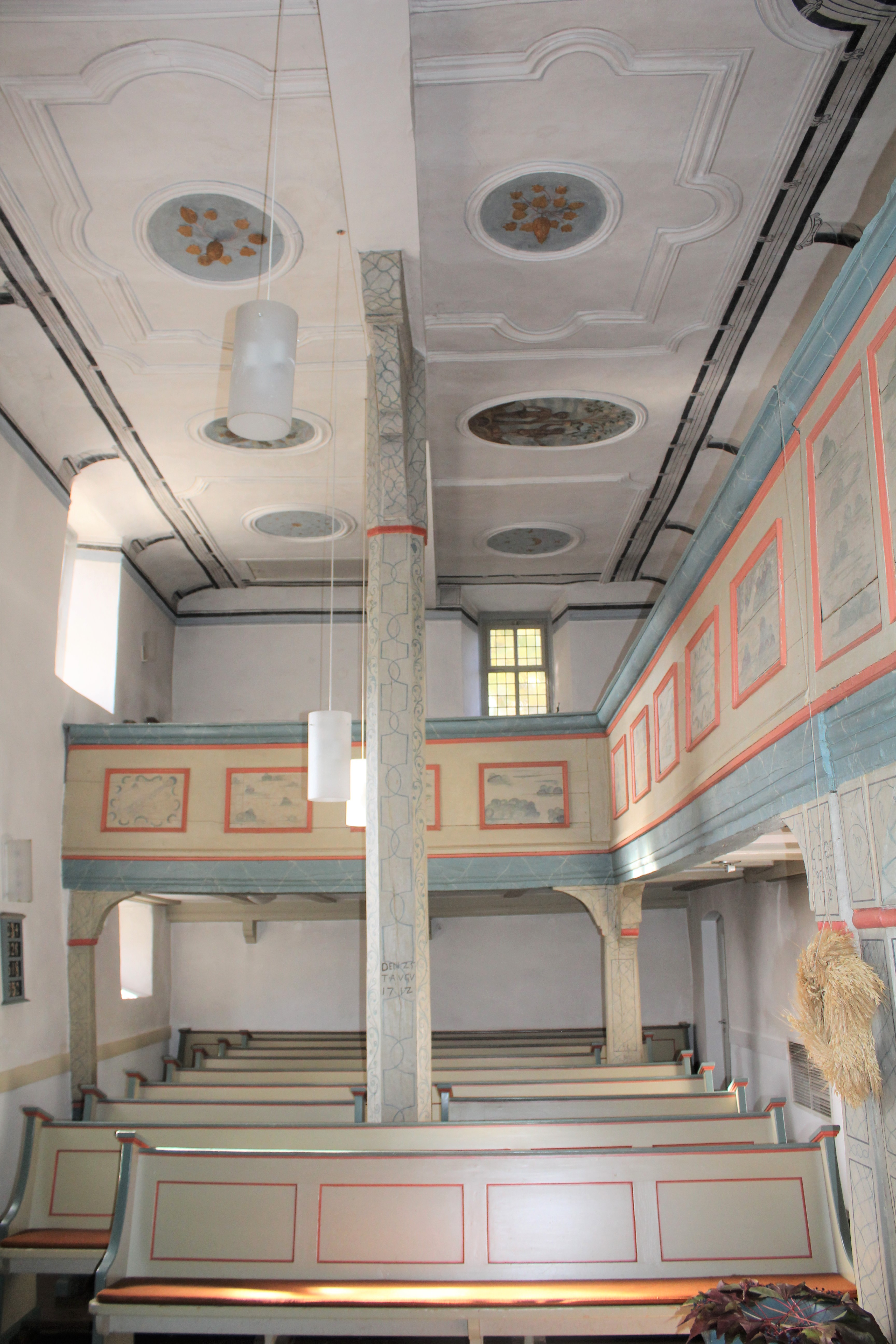 Evangelische Kirche Blasbach, Wetzlar, Lahn-Dill-Kreis, Hessen, Deutschland